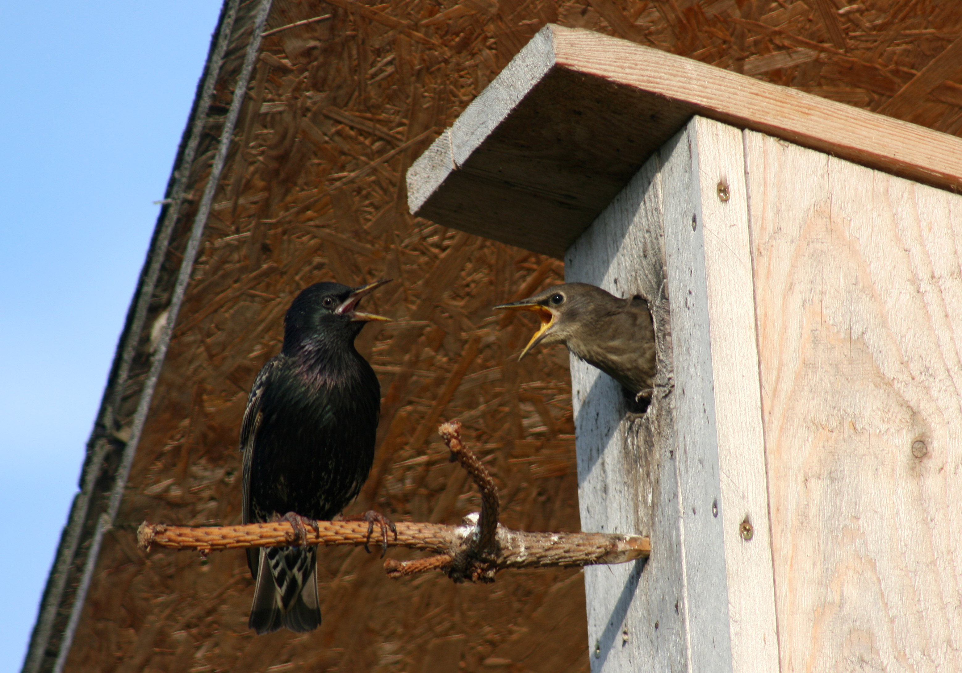 Sturnus vulgaris